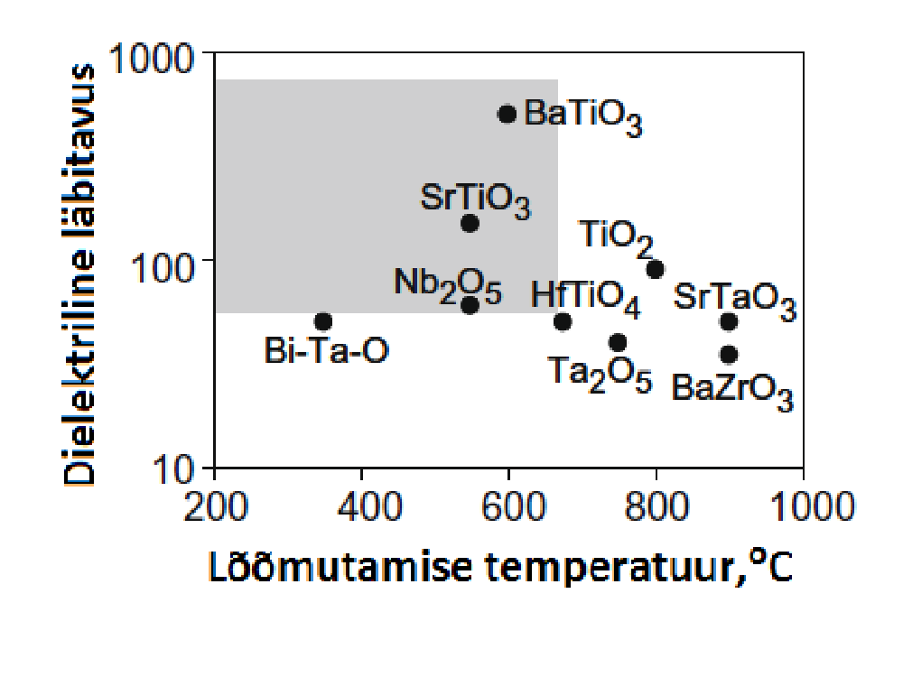 Erinevate materjalide kõrge dielektrilise läbitavuse saavutamiseks vajalik lõõmutustemperatuur